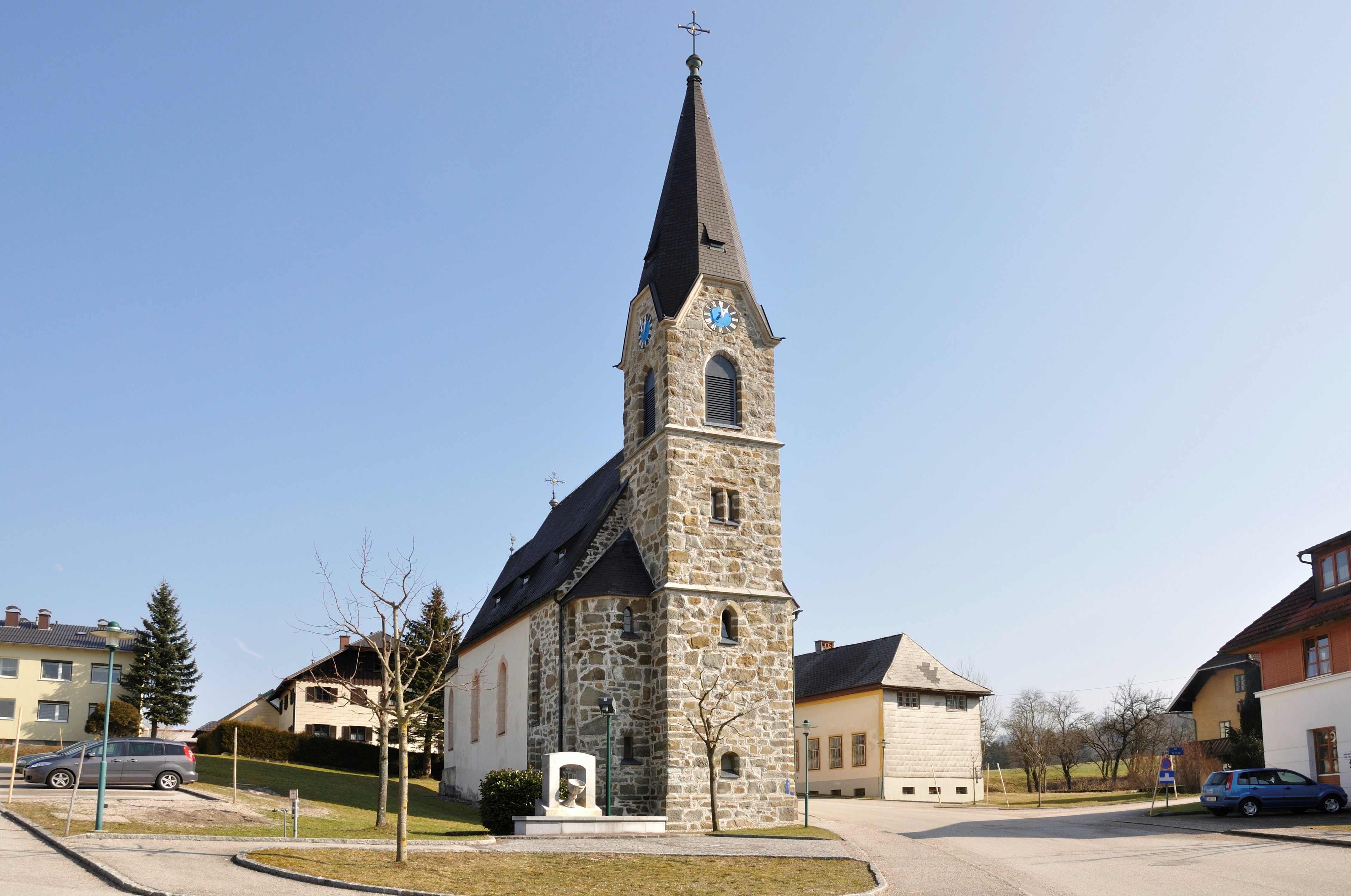 Kath. Pfarrkirche hl. Konrad mit Friedhofsfläche